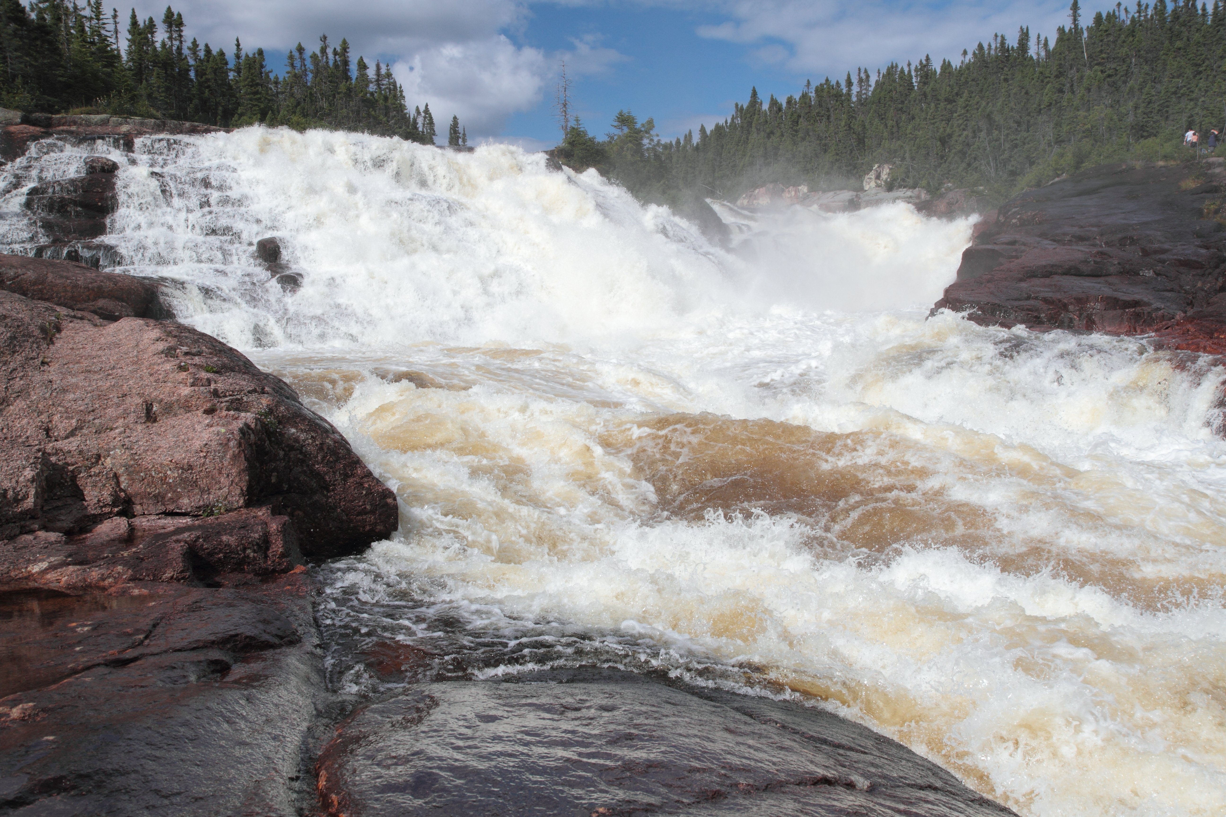 Chute sur la rivière Manitou, Minganie, Québec, Canada